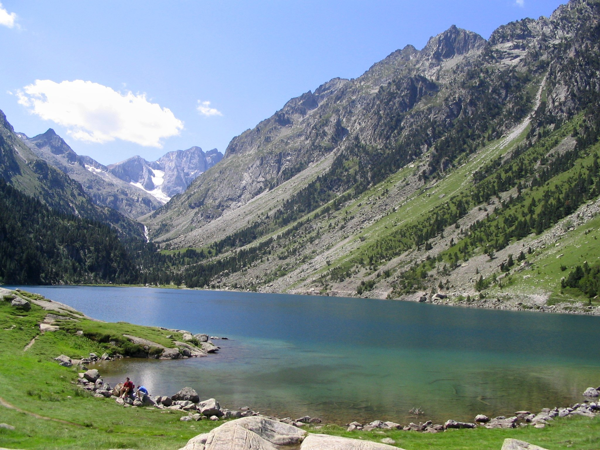 Lago de Gaube, Pirineos franceses